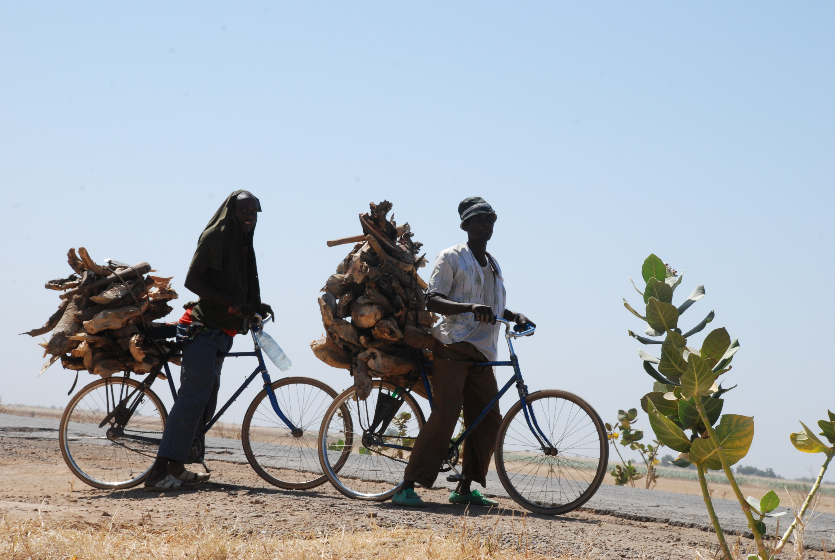 Paysans se déplaçant à vélo ayant transporté des provisions, dans la ville de Maroua This is an image with the theme "Africa on the Move or Transport" from: Cameroon